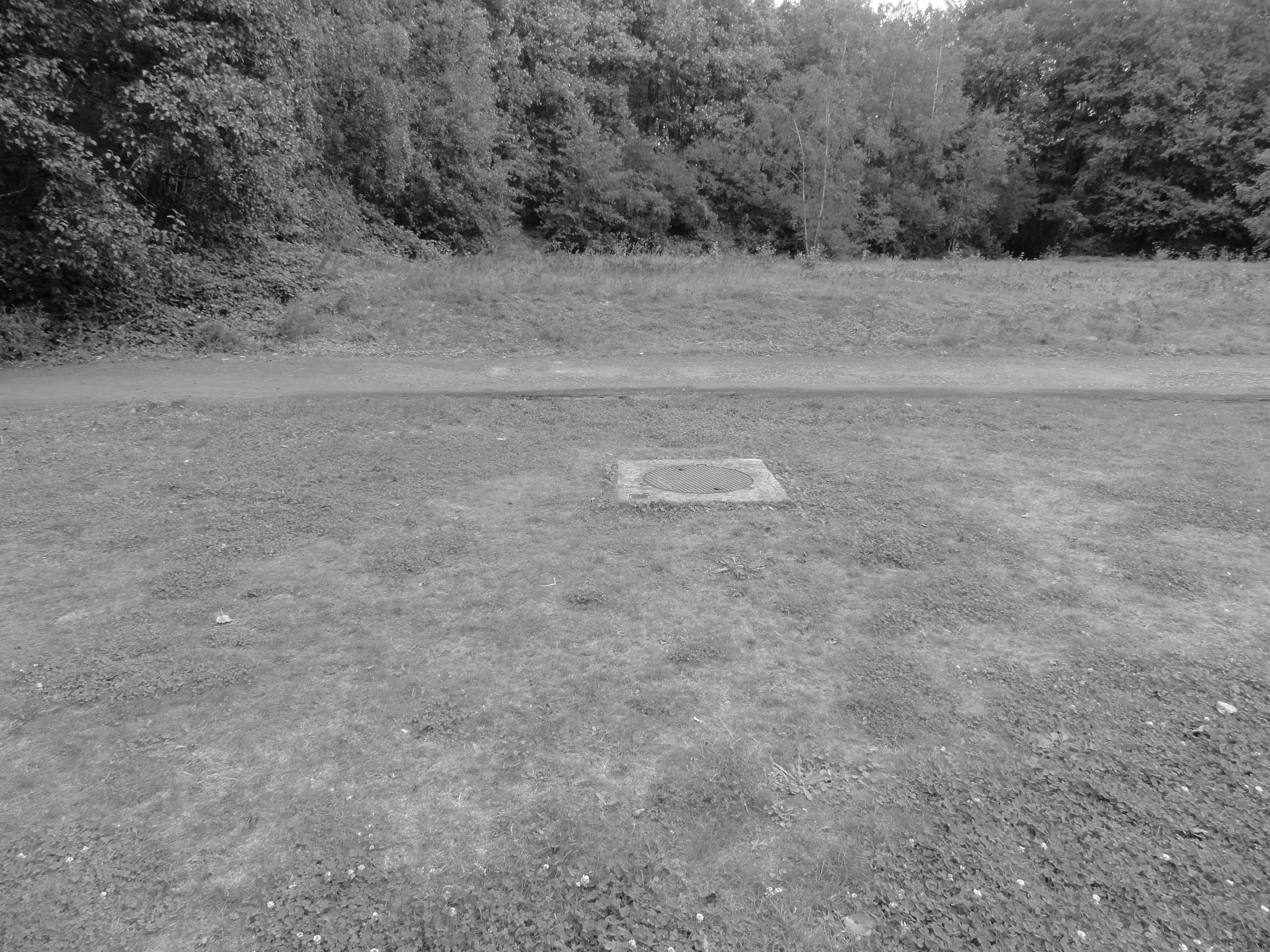 La Fosse n° 3 - 4 de la Compagnie des mines de Meurchin était un charbonnage constitué de deux puits situé à Wingles, Pas-de-Calais, Nord-Pas-de-Calais, France.